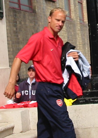 Arsenal striker Dennis Bergkamp